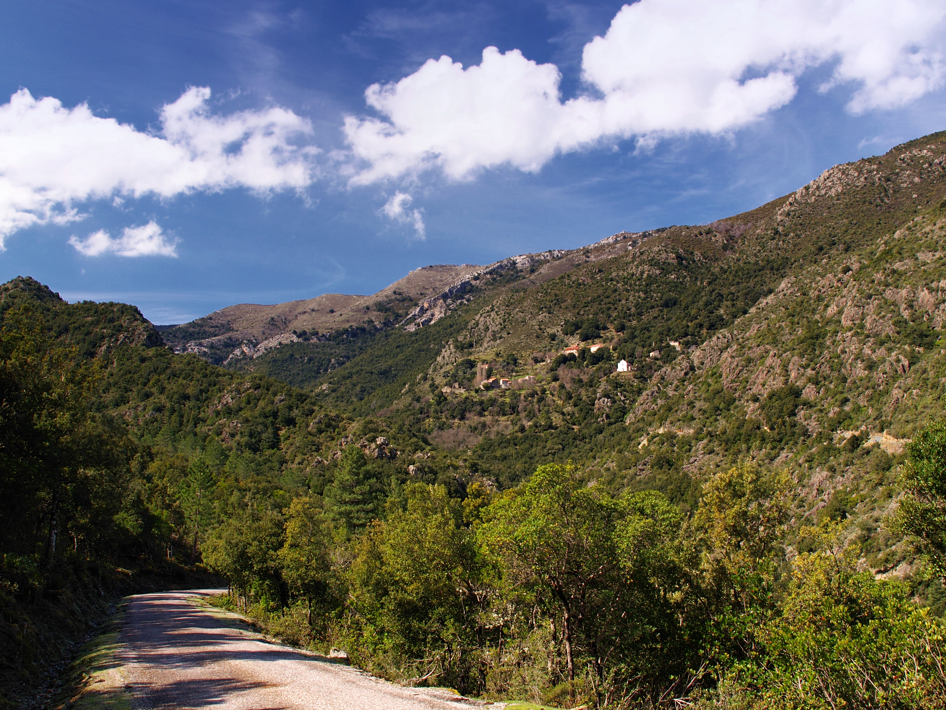 Lano (Corsica) - Vallée de l'Anico